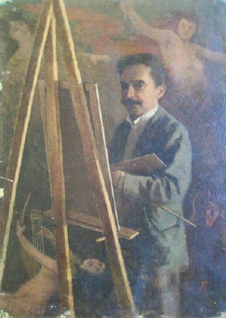 Autoritratto, olio su tela, 30 x 40 cm.